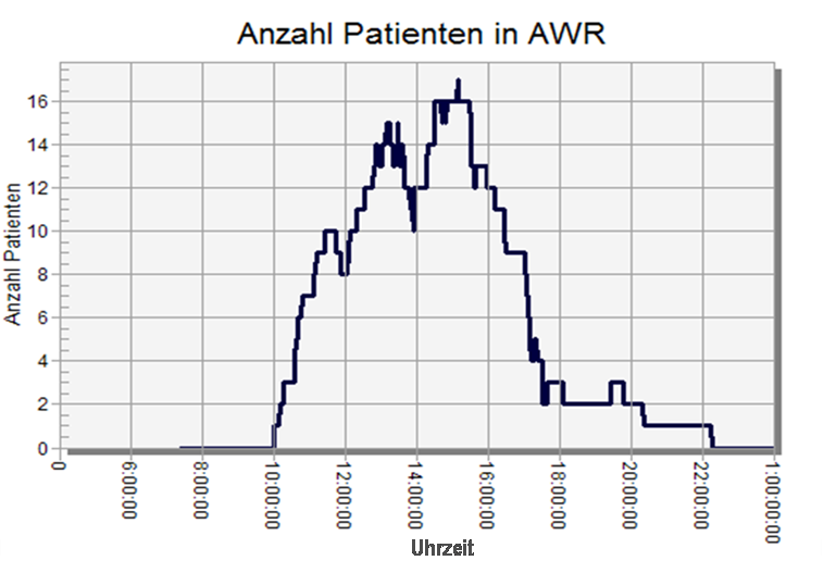 Anzahl Patienten im Aufwachraum